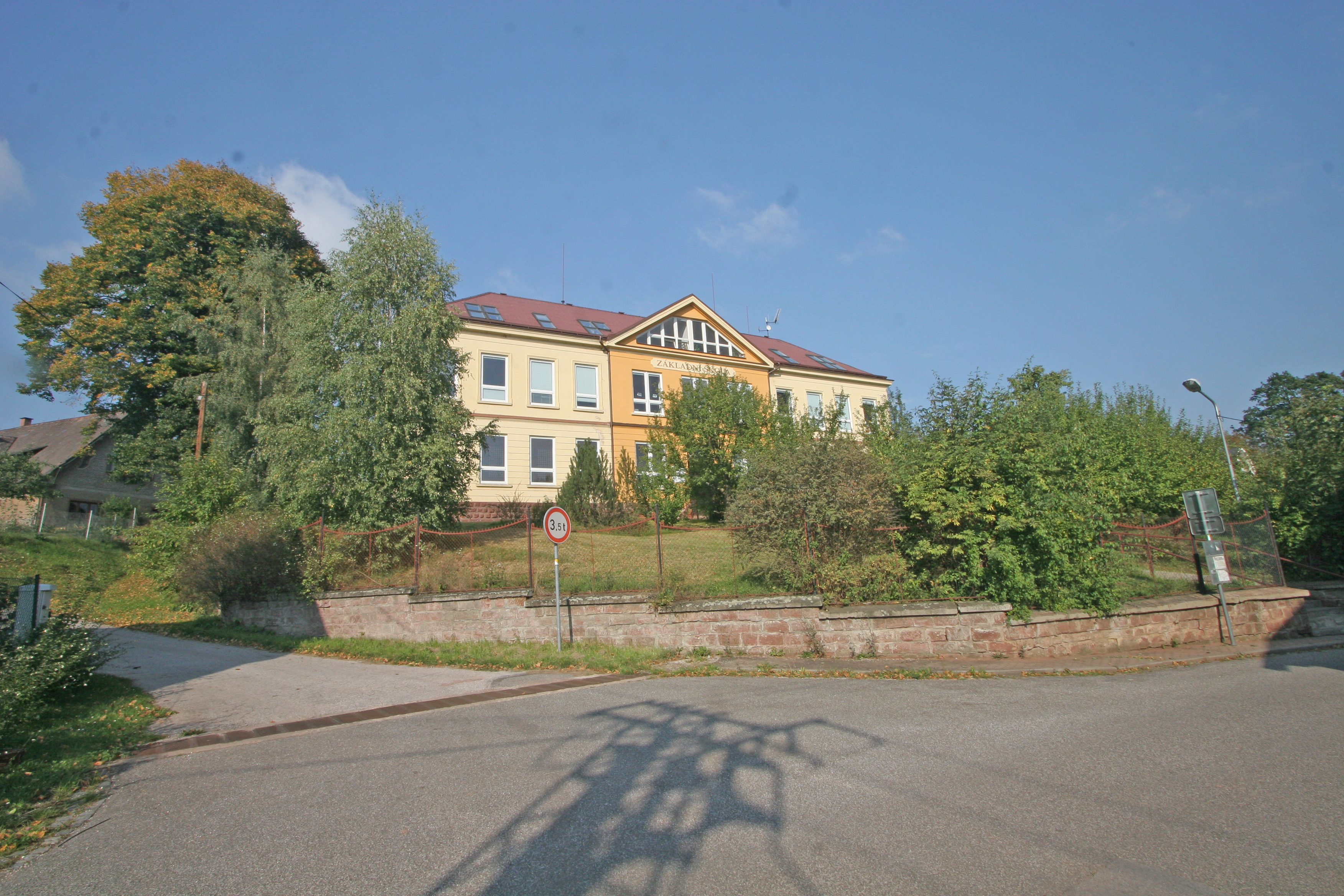 Voletiny speciální škola